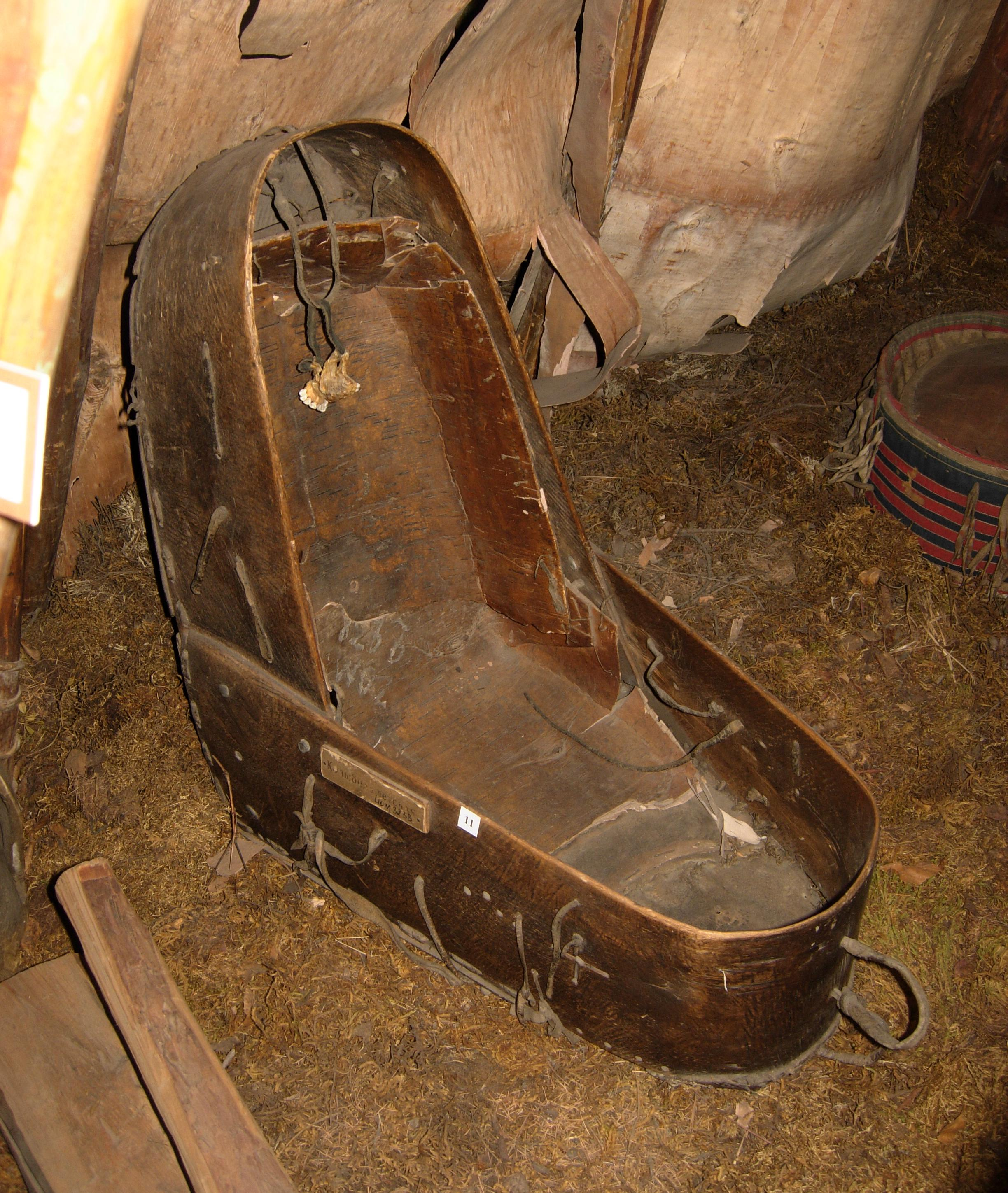 Эвенкийская колыбель из экспозиции Забайкальского краевого краеведческого музея им. А. К. Кузнецова